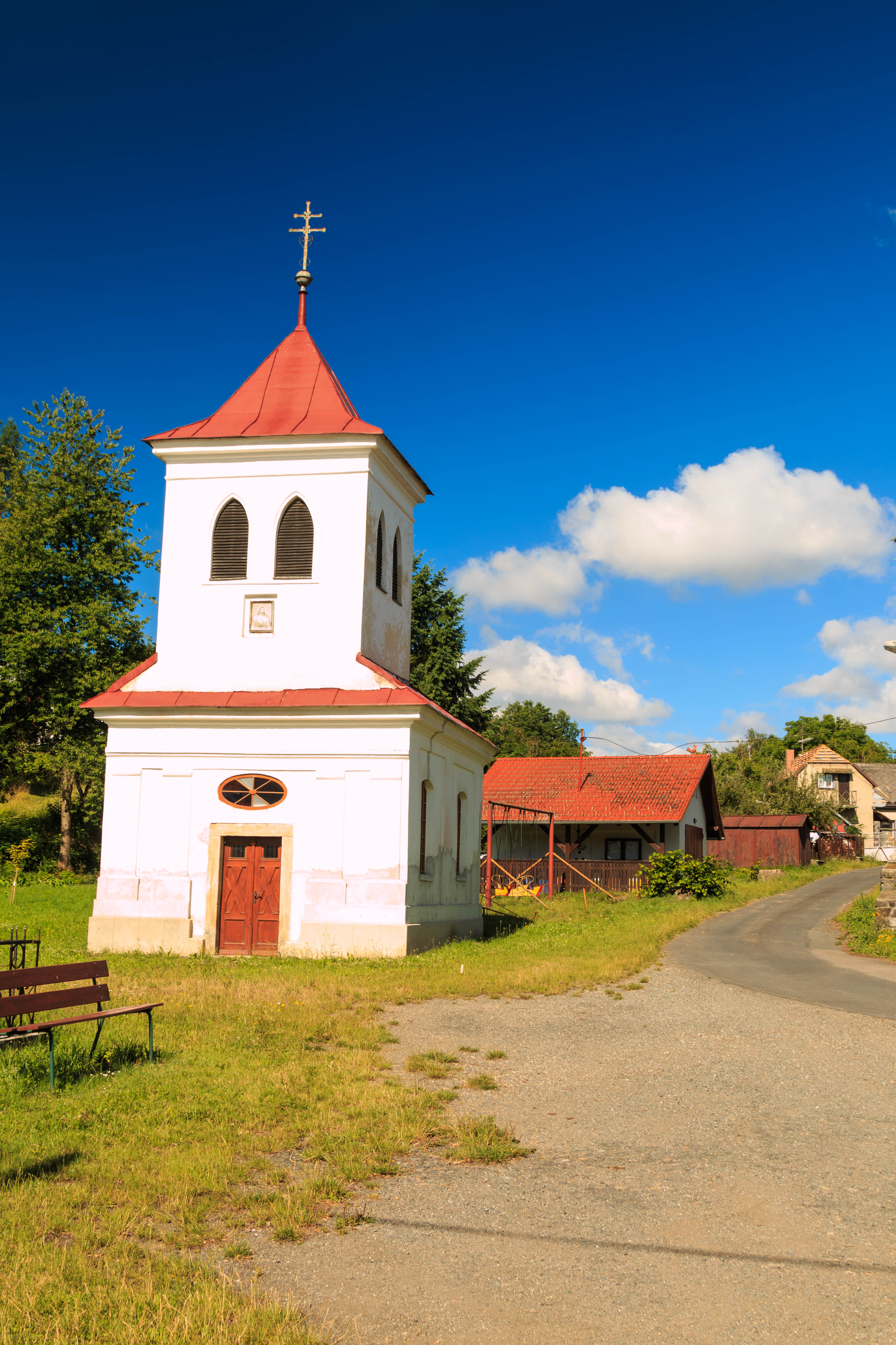 Kaplička v Bludově